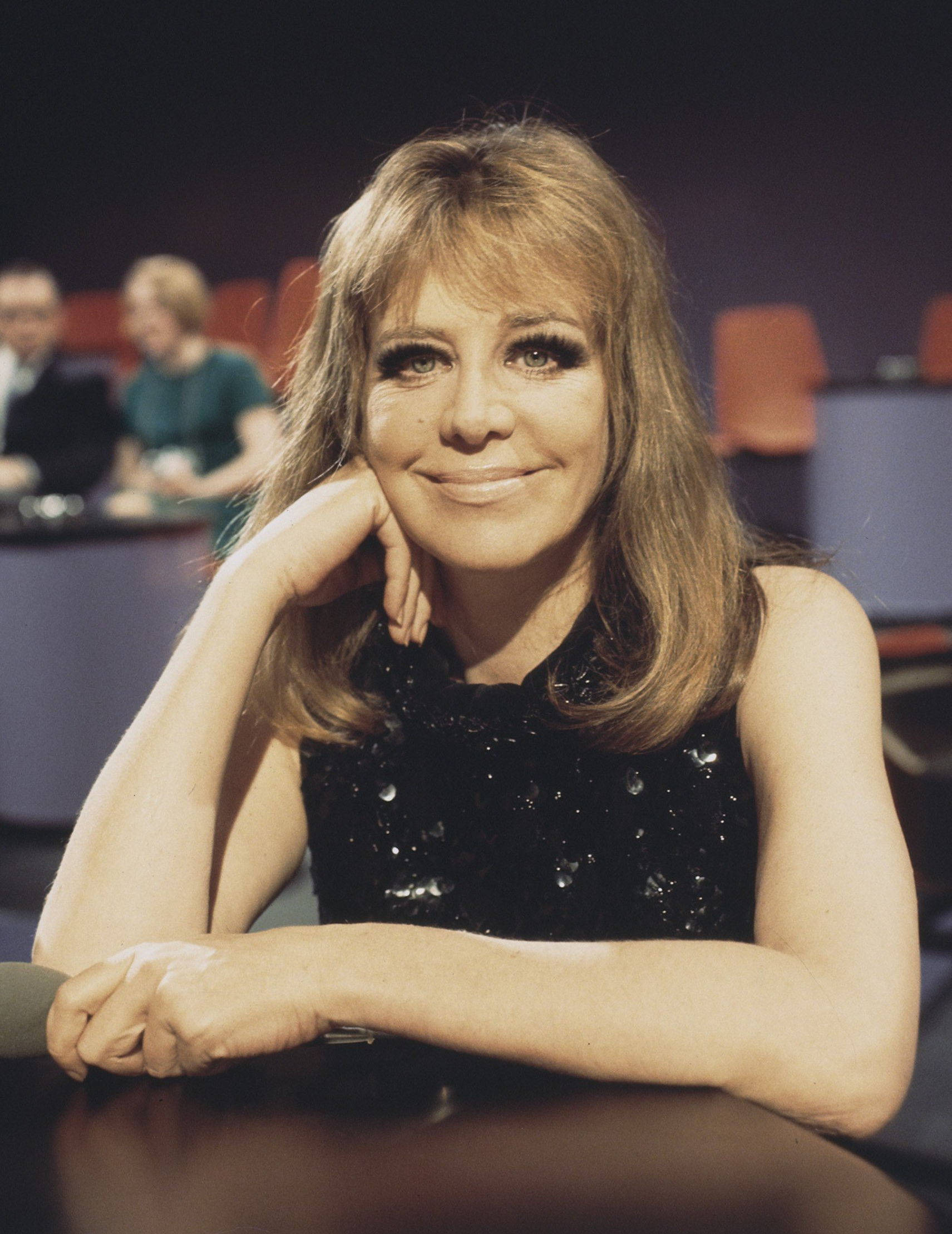 Duitse zangeres Hildegard Knef maakt TV opnamen